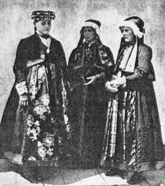 Hochzeitstracht aus Schönwald bei Gleiwitz